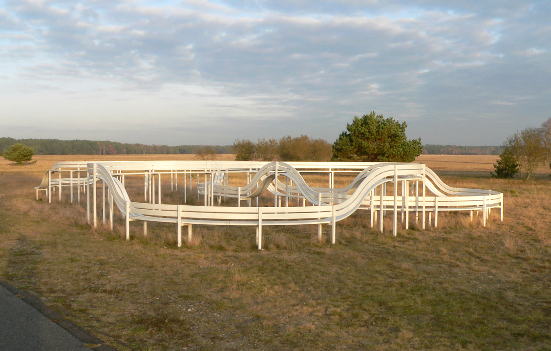 Camp Reinsehlen Kunstobjekt Parcour von Jeppe Hein